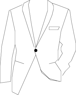 Tecknad bild av enkelknäppt kavaj med sjalslag och en knapp. Teckning: Arbapp